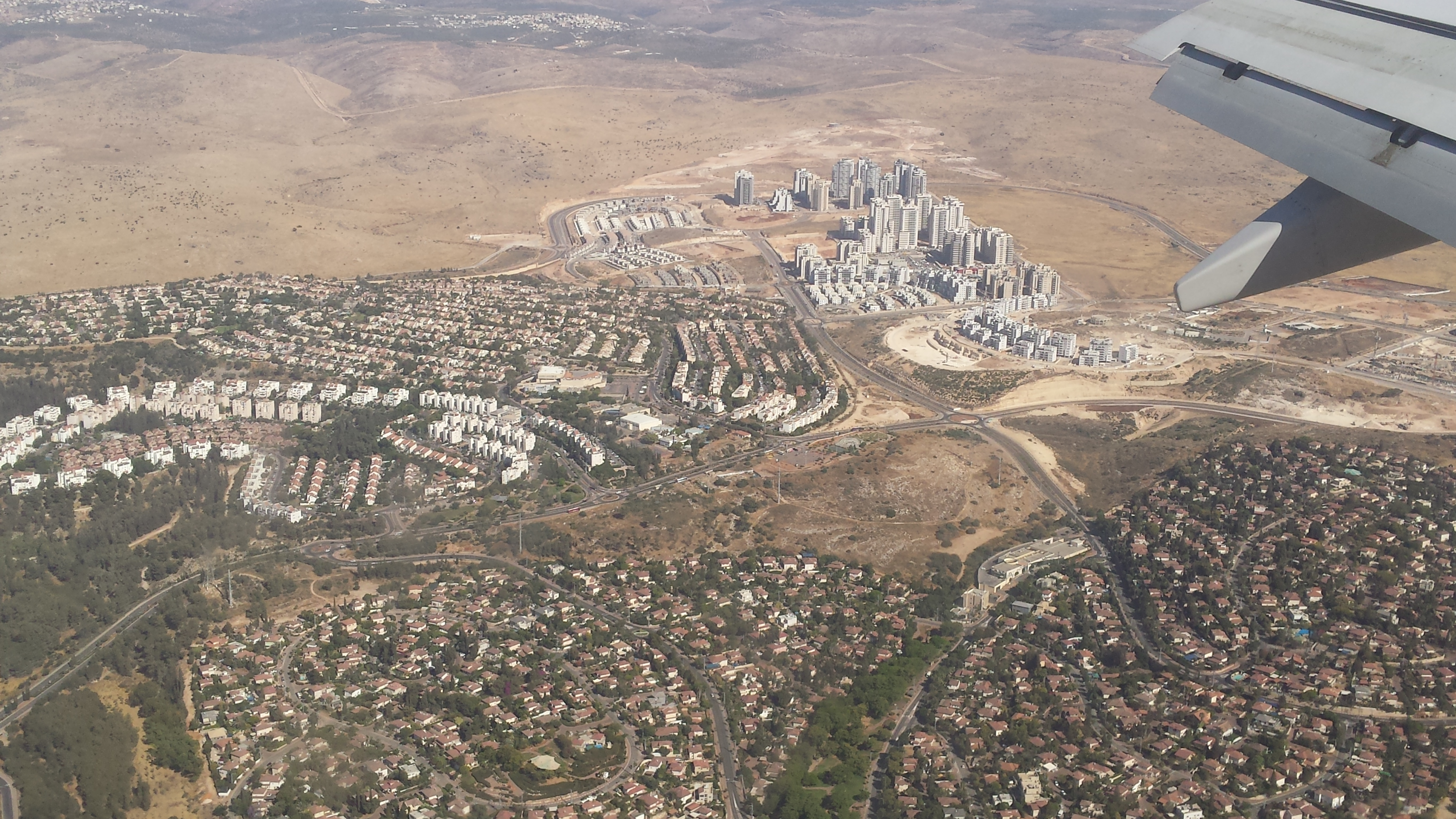 מבט האוויר של ראש העין מזרח